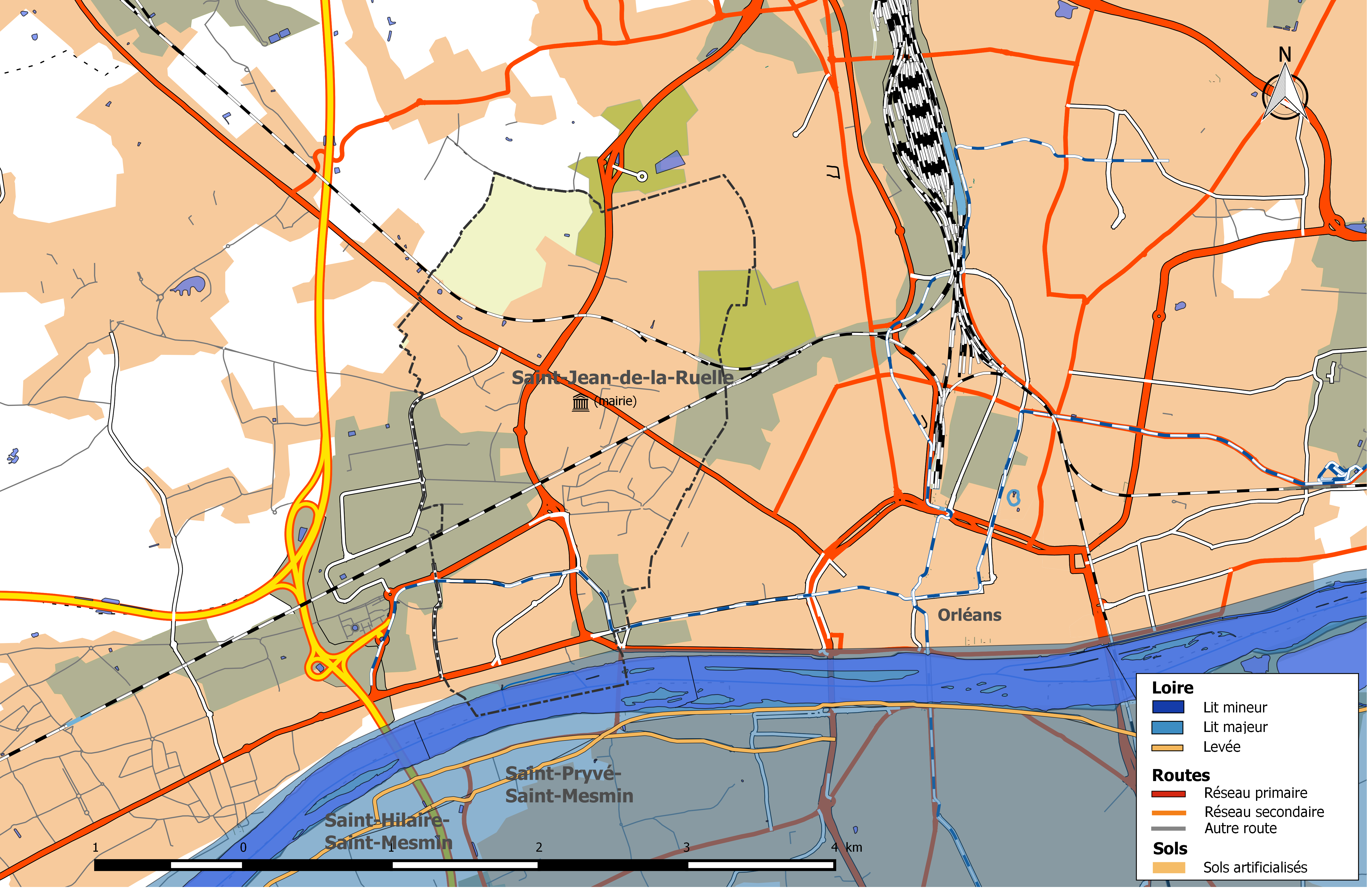 Zone inondable et réseaux hydrographique et routier de la commune de Saint-Jean-de-la-Ruelle.